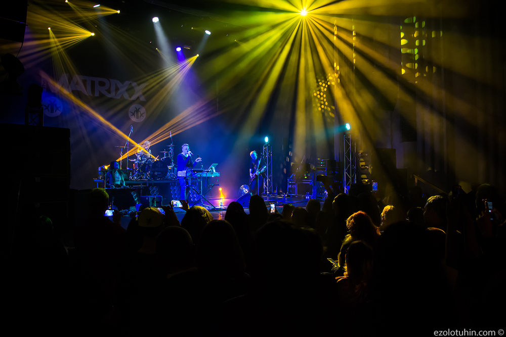 Выступление The Matrixx в Кемерово, 2018 г.